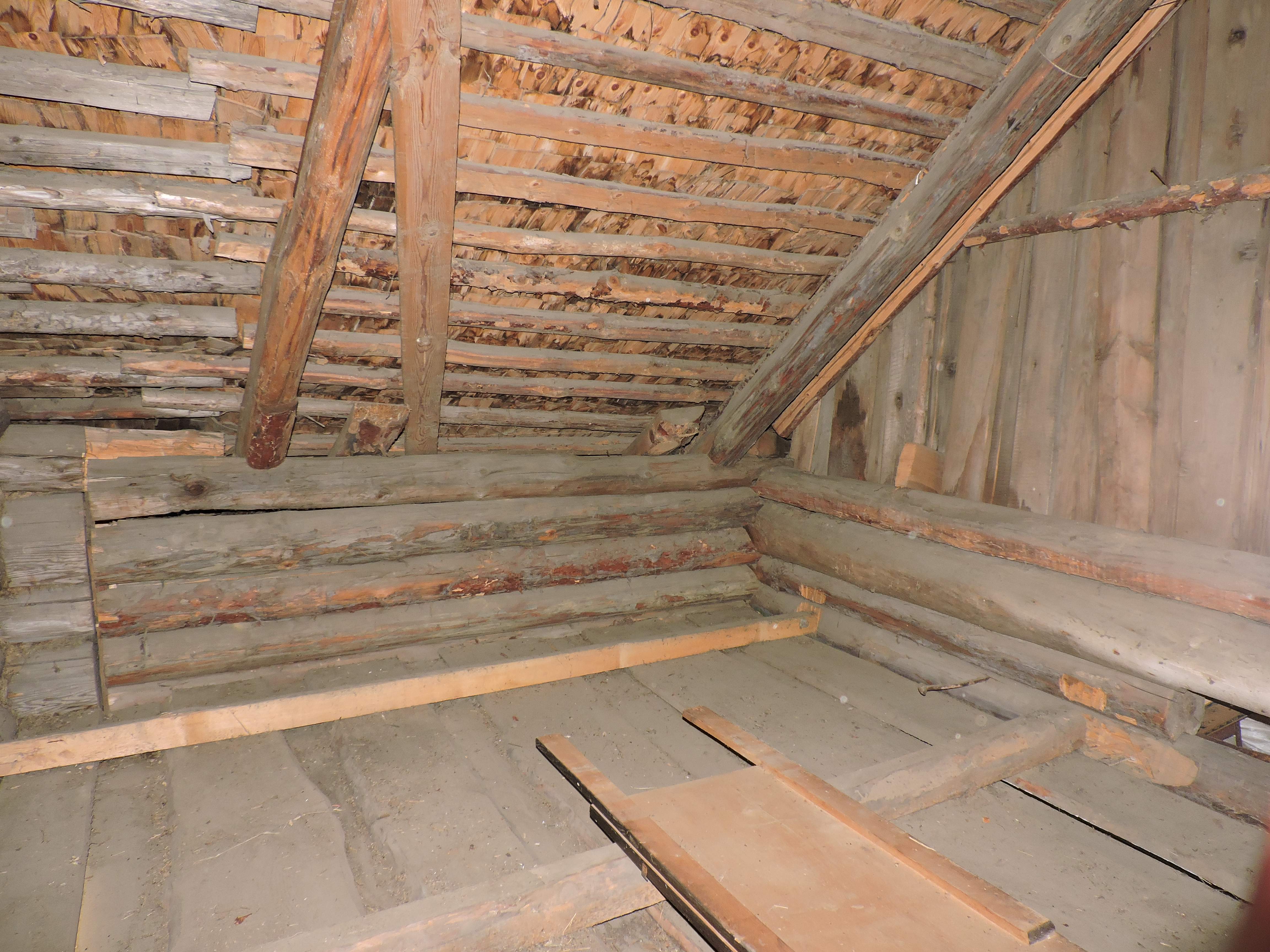 Обрешётка